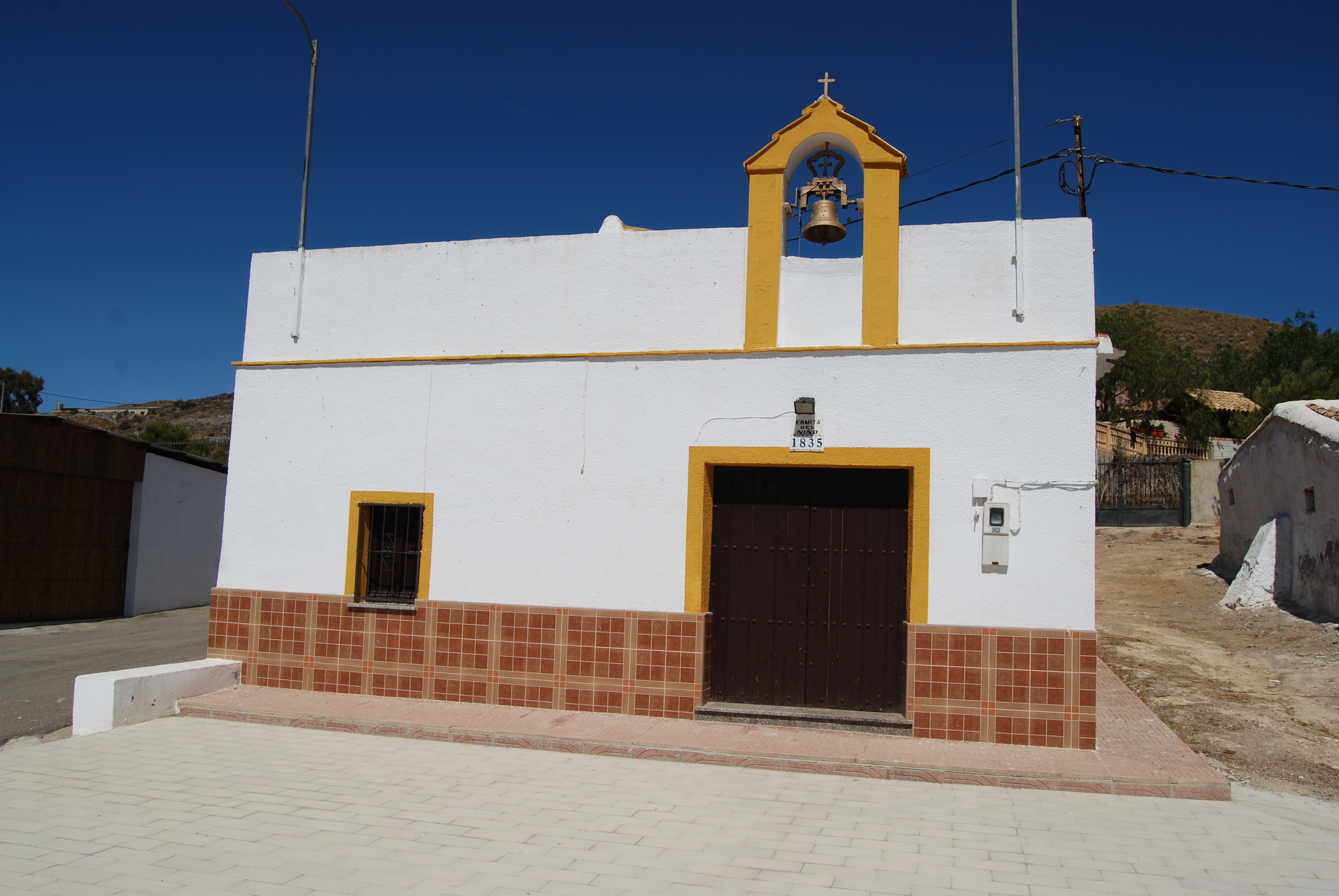 Vista de la Fachada de la ermita